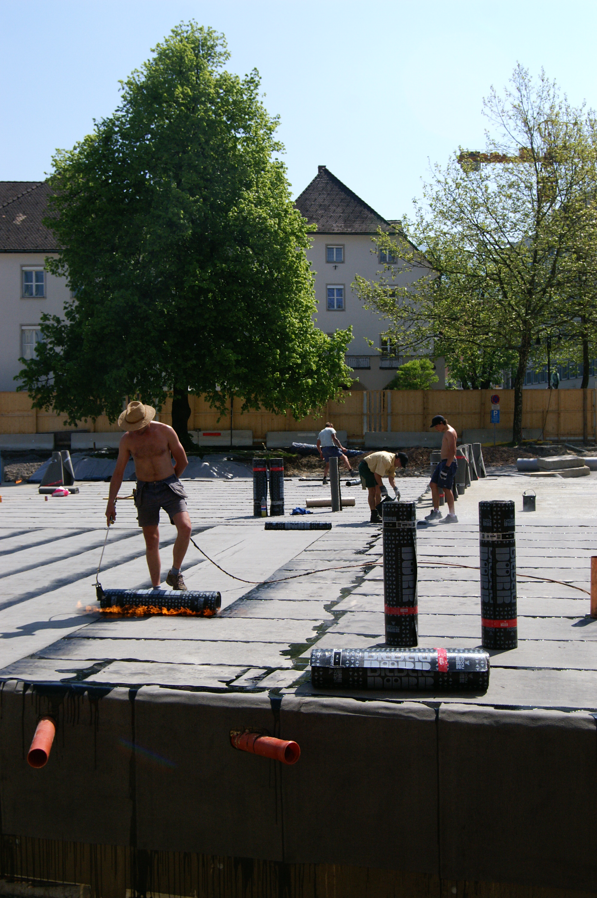 Dachpappe oder Bitumen-Dachbahn ist eine mit Bitumen getränkte Pappe, die als Feuchtigkeitsperre in Bauteilen dient. Hier Arbeiten im Zuge der Sanierung der Stadtstrasse sowie der Parkplatzbewirtschaftung in Dornbirns Innenstadt mit Überbauung des Mäserareals. 2008